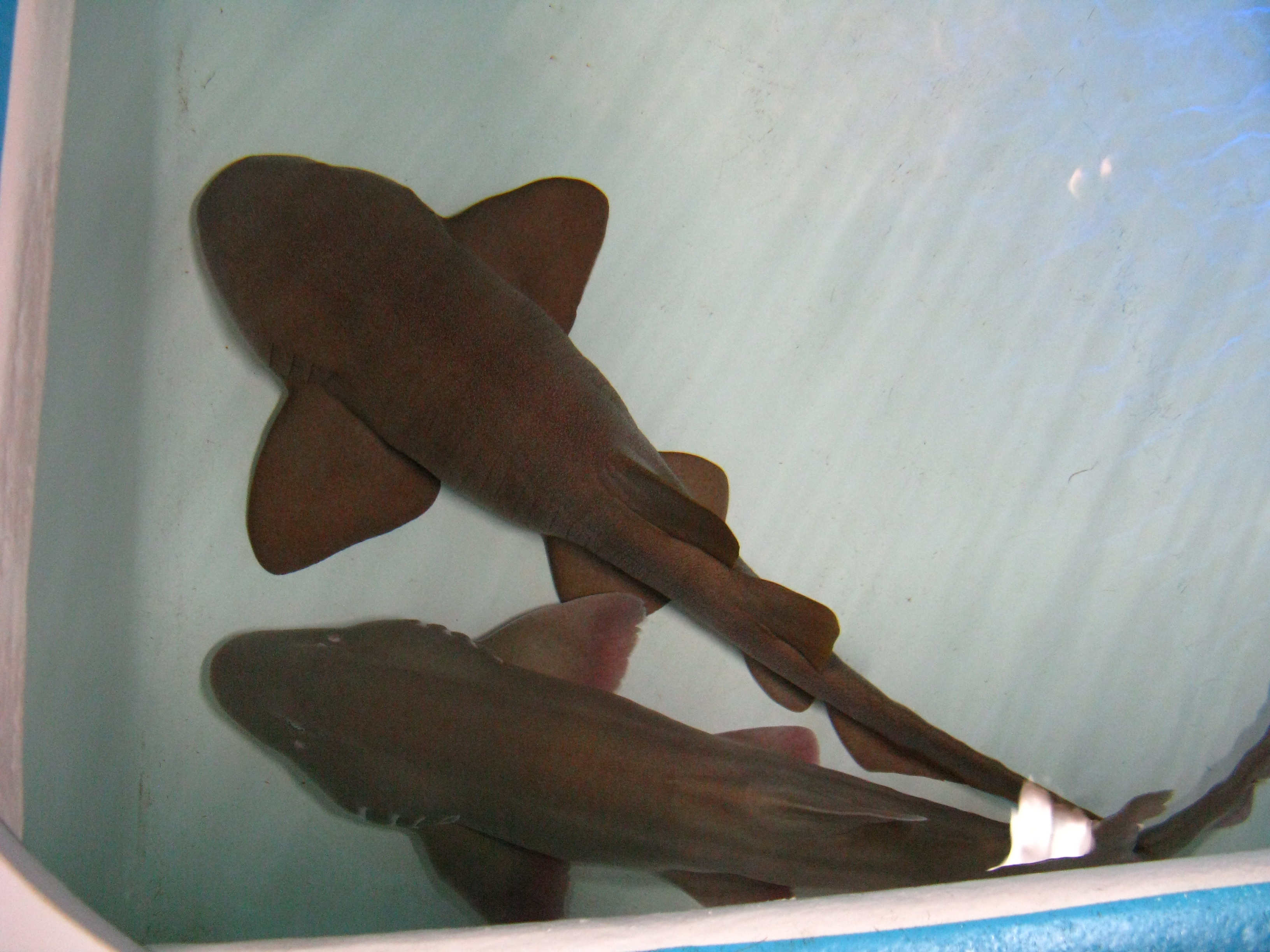 Scientific name Ginglymostoma cirratum